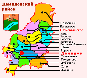 Административная карта Демидовского района Смоленской области